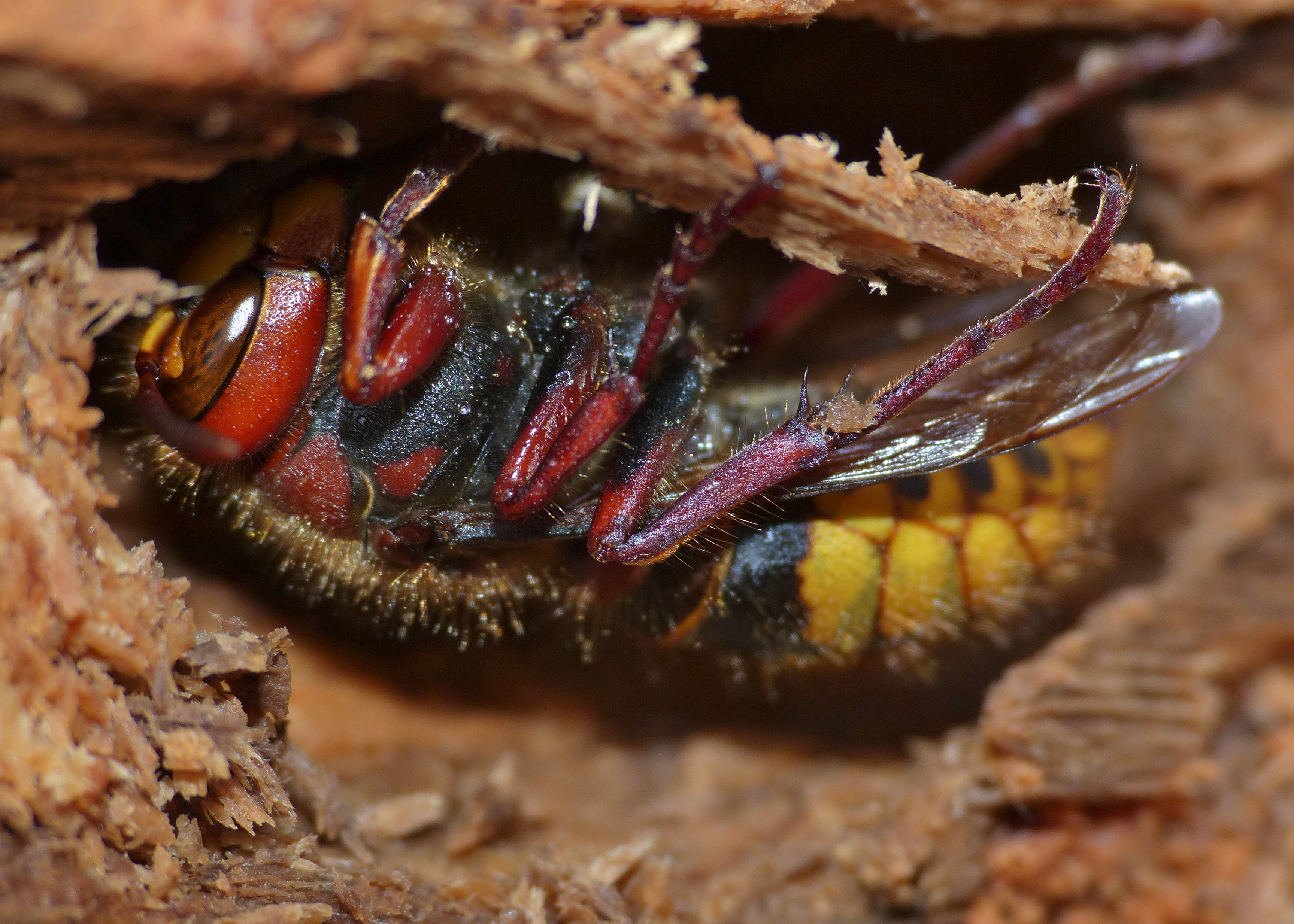 Forêt d' Ecouves, Orne, FRANCE